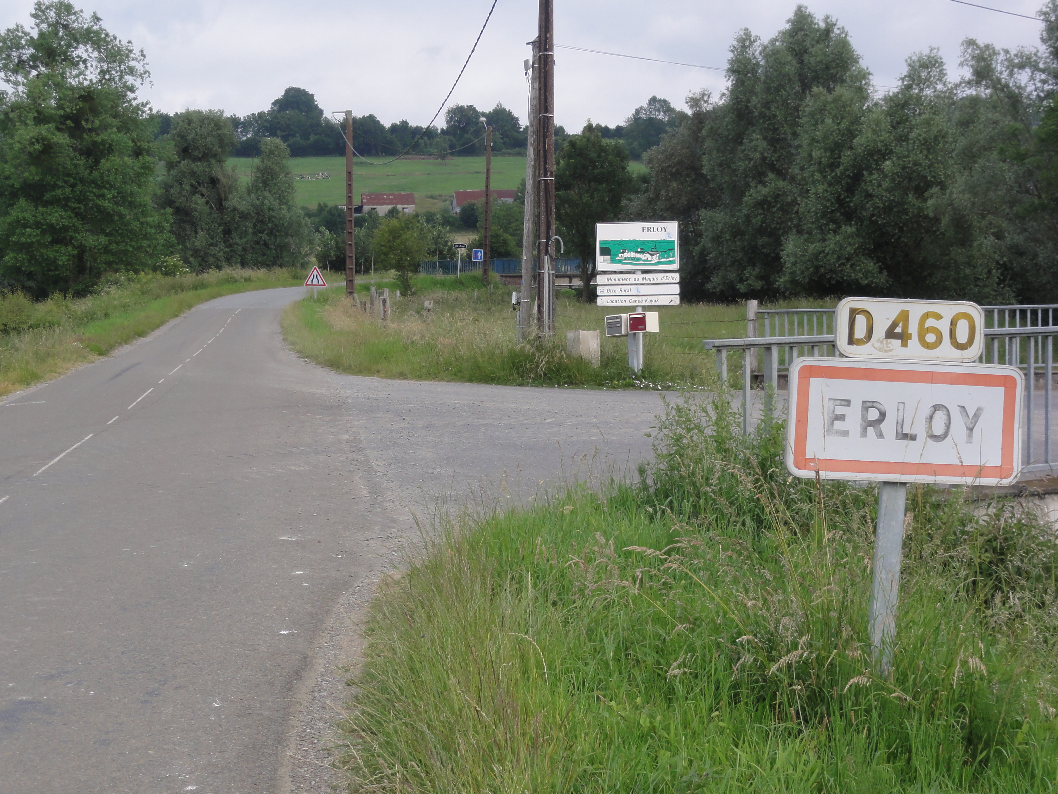 Erloy (Aisne) city limit sign